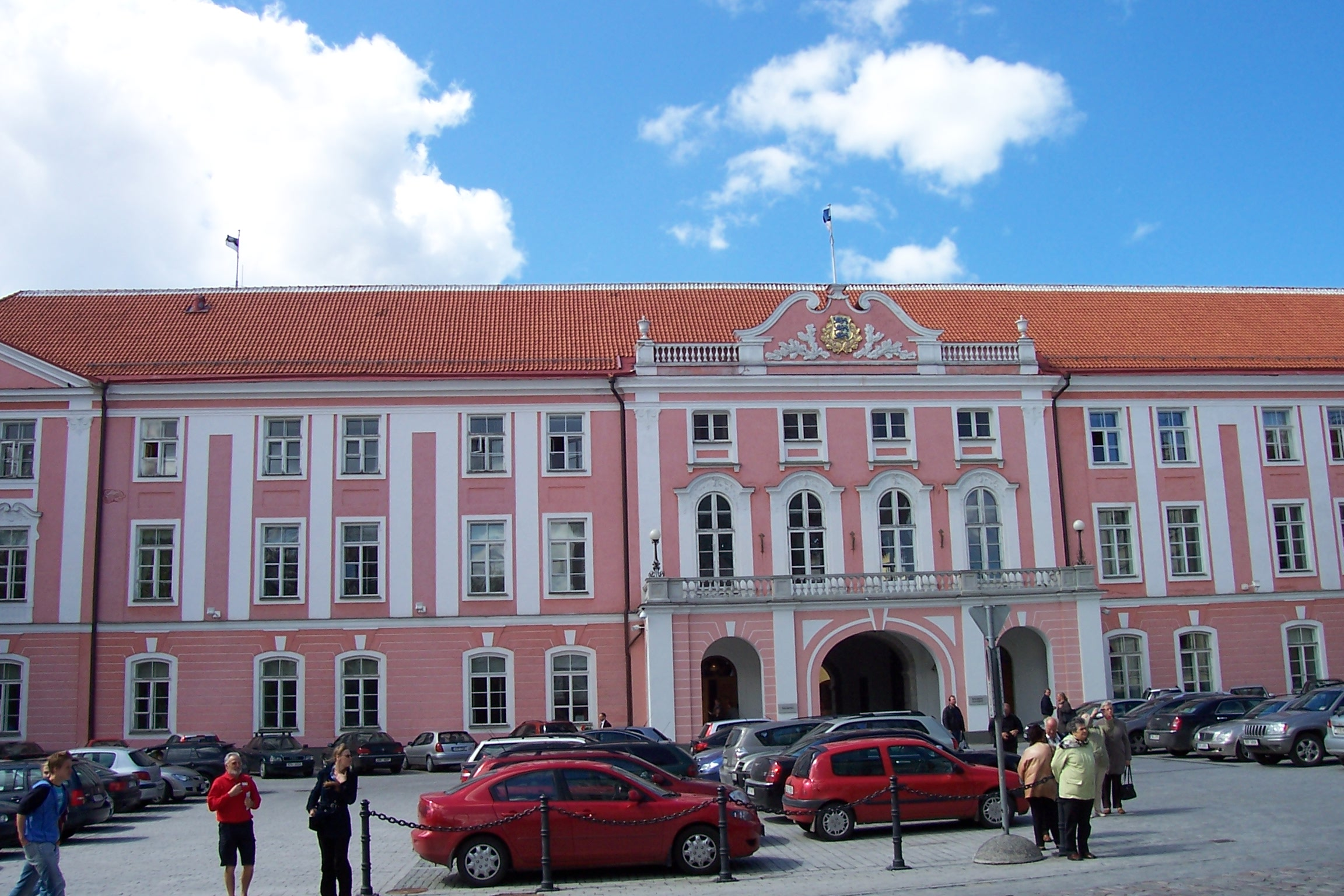 Vista del Parlamento de Estonia